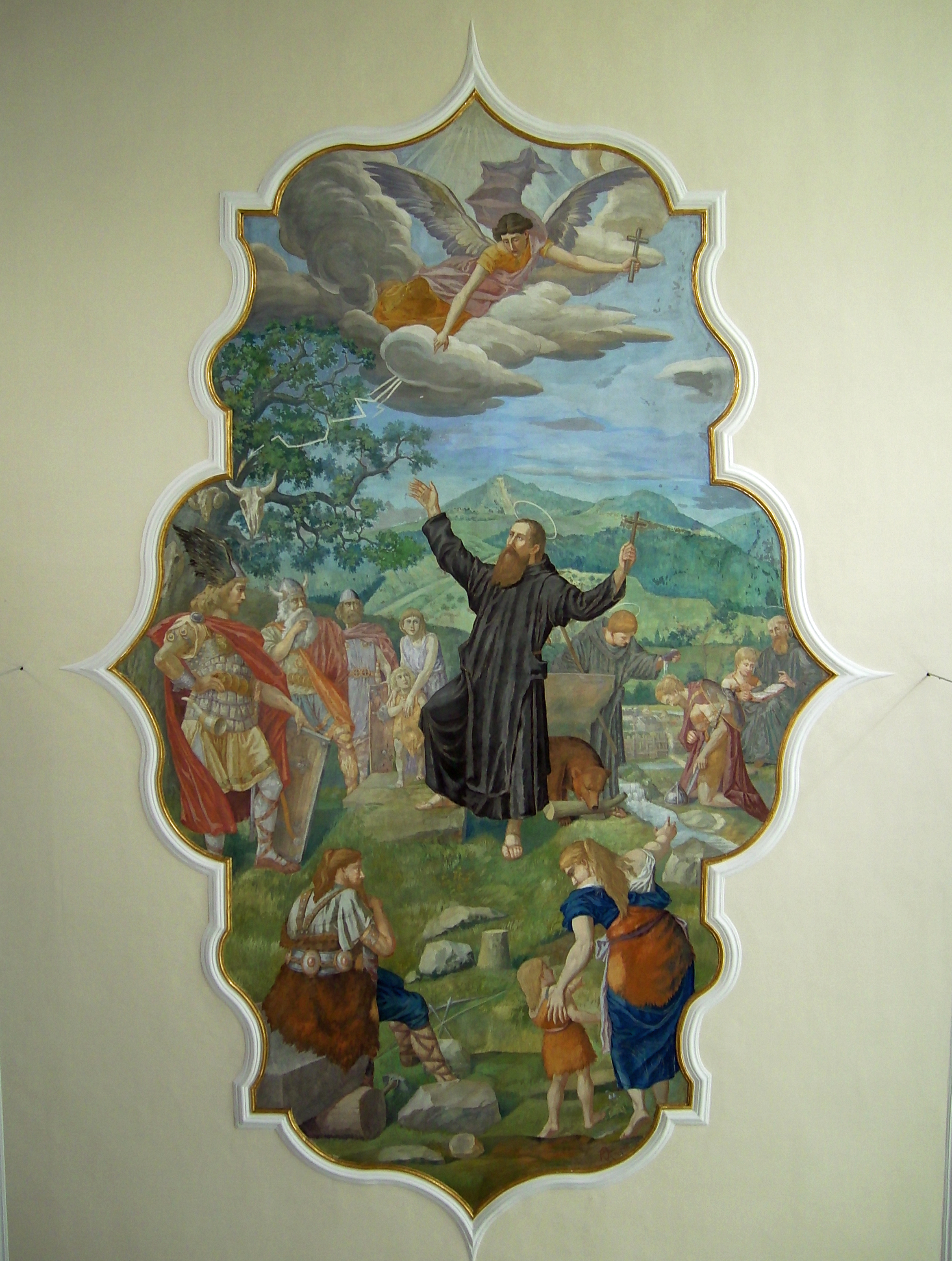 Schömberg-Schörzingen: Sankt Gallus Kirche. Konrad Albert Koch: Sankt Gallus bekehrt die Alamannen